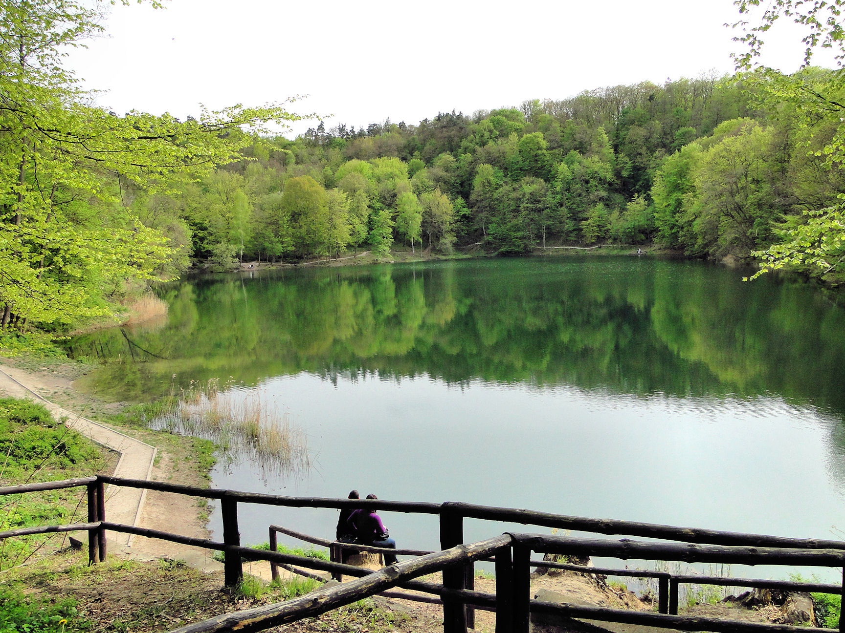 Jezioro Szmaragdowe